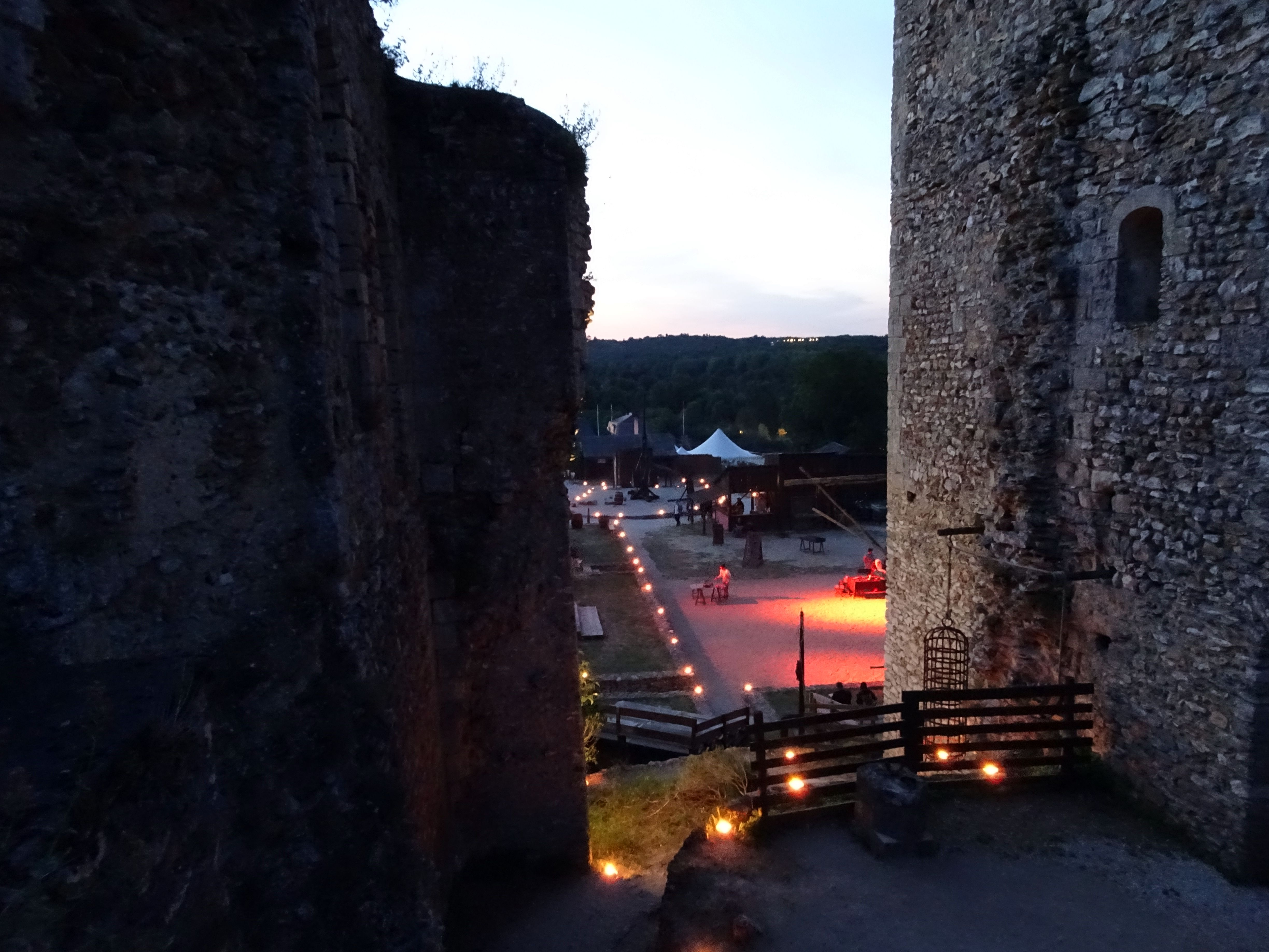 Donjon de Montbazon de nuit, à la bougie.